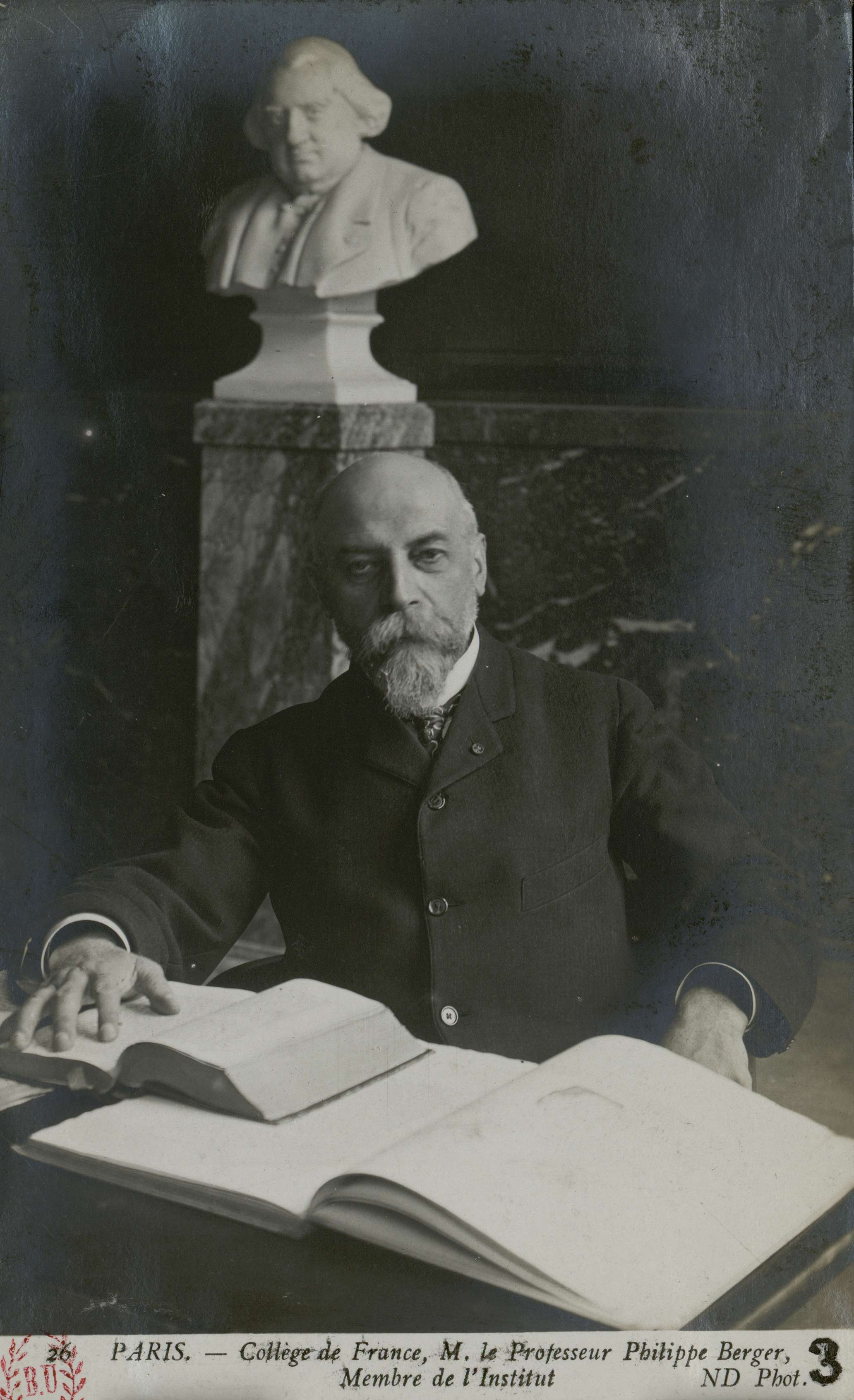 Carte postale